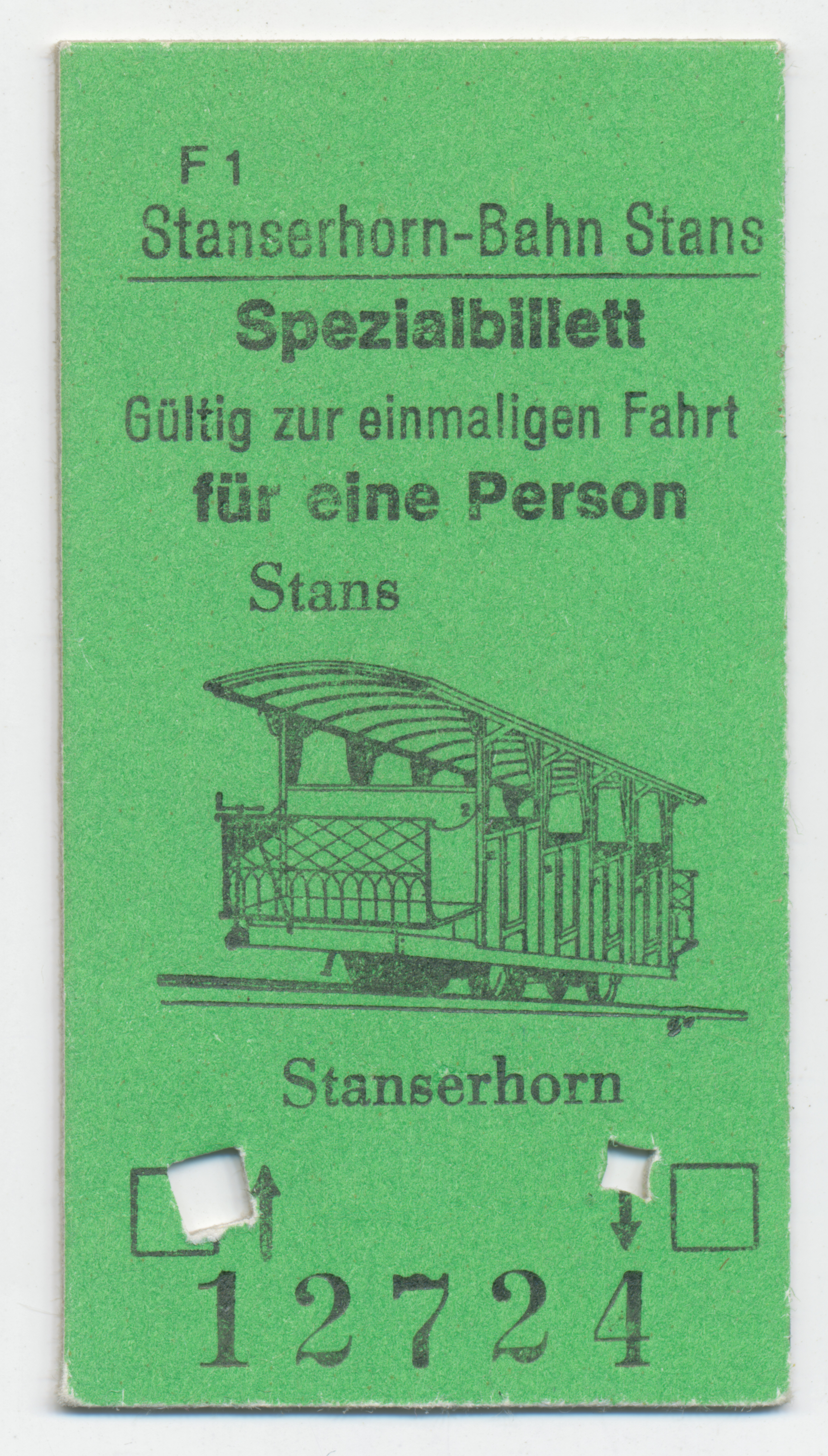 Специальный билет для одной поездки на старинном фуникулёре на гору Штансхорн (Швейцария) для одного человека. 2000 год.